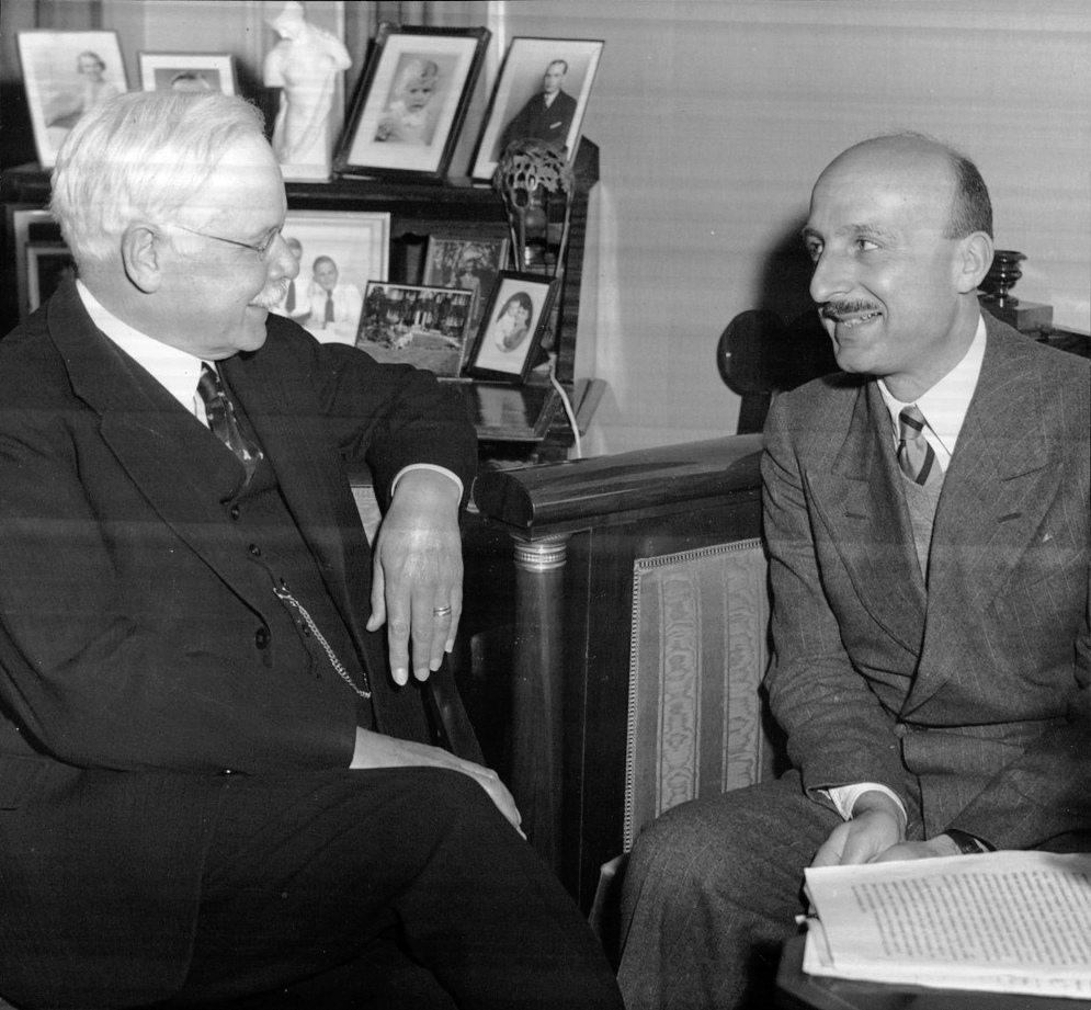 Justitsierådet Bagge och professor Matteucci.Generalsekreteraren i Internationella institutet för unifiering av privaträtten, doktor M. Matteucci, som för närvarande besöker Stockholm på inbjudan av juridiska fakulteten vid Stockholms högskola, berättar vid ett samtal med Svenska dagbladet, att han kommer att hålla fyra föreläsningar här. "Jag kommer att tala om 'Den romerska rättens universalitet', 'Code Napoléonsåsom en källa för den moderna rättens kodifikation' och 'Rättens internationella kodifiering', säger doktor Matteucci. Dessa ämnen är för närvarande av speciellt intresse med hänsyn till det internationella lagstiftningsarbete som pågår delvis på initiativ av Internationella institutet för unifiering av privaträtten.